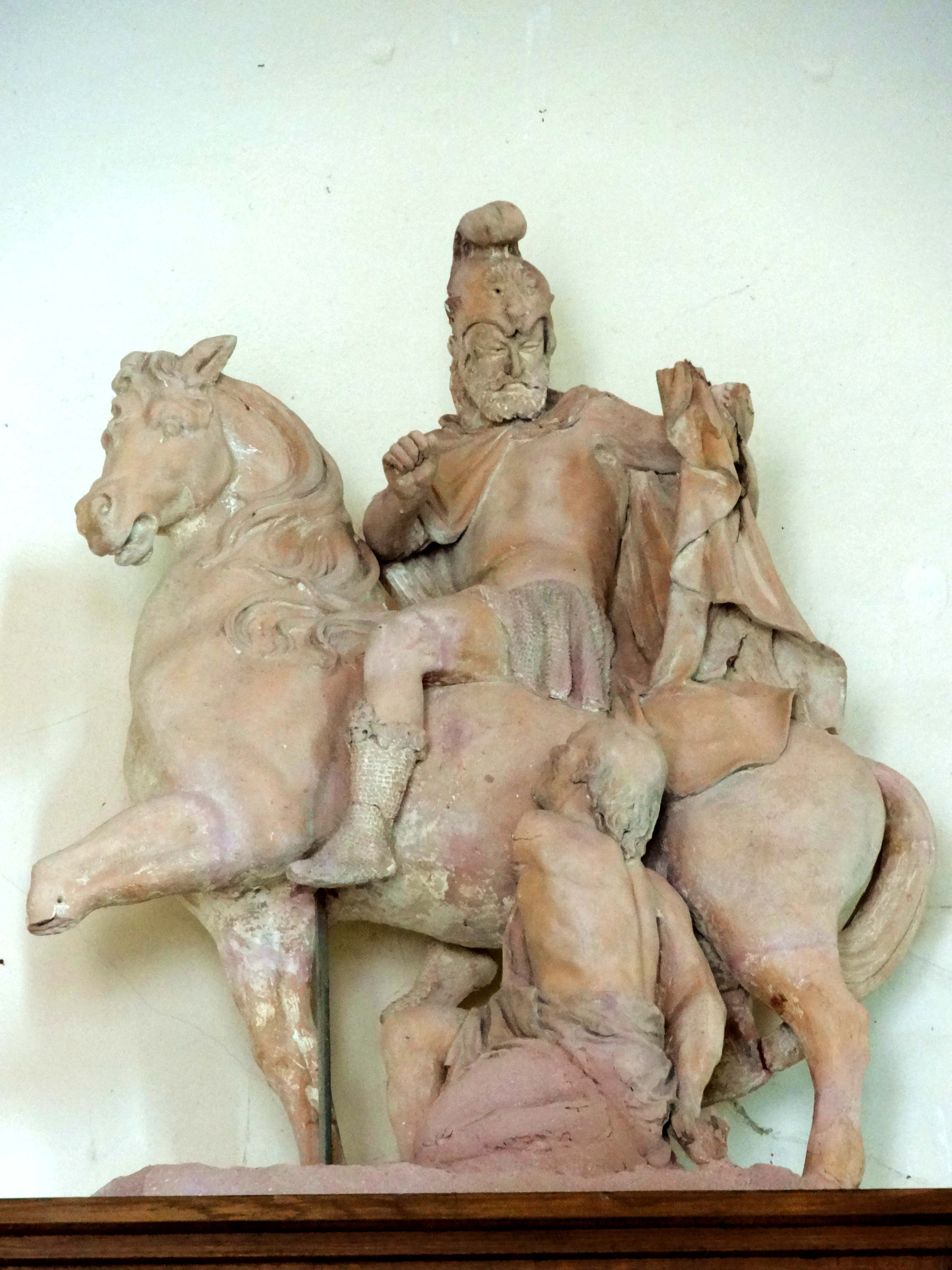 Mobilier de l'église - voir titre.